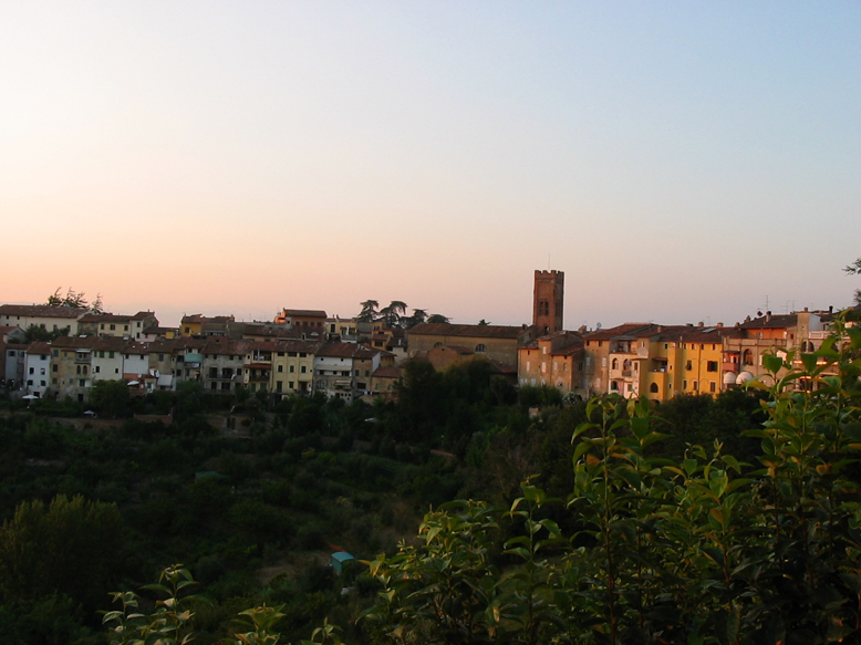 Panorama di Montopoli V/A da Via Sottofossi